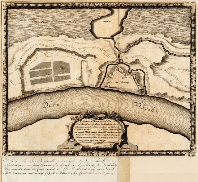 Scan from Johann Christoph Brotze's book Sammlung verschiedner Liefländischer Monumente. Delineatio Geometrica Urbis et Arcis Duneburgh ... [1655; die Gravüre]